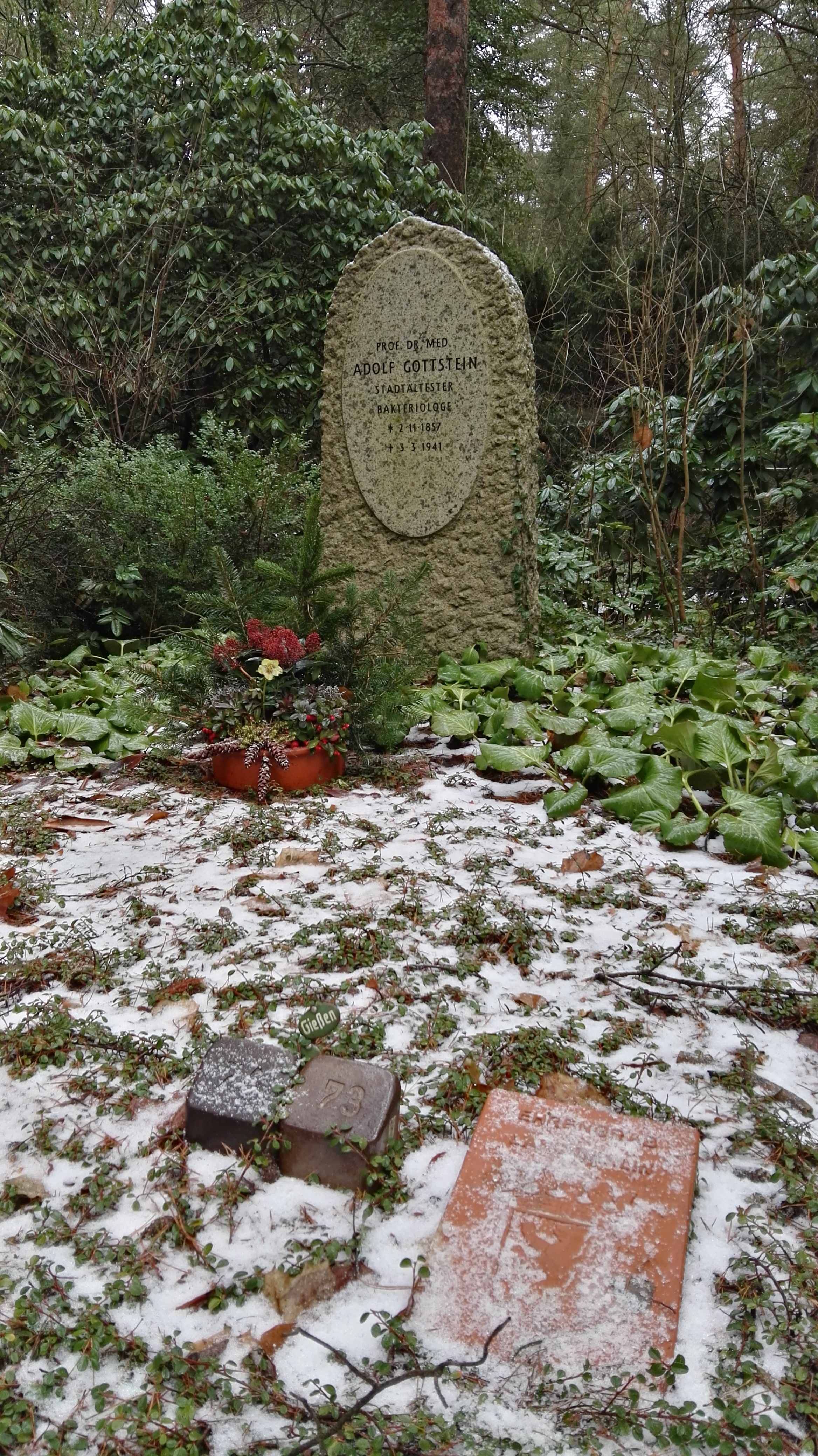 Grab von Adolf Gottstein auf dem Südwestkirchhof Stahnsdorf; Ehrengrab der Stadt Berlin